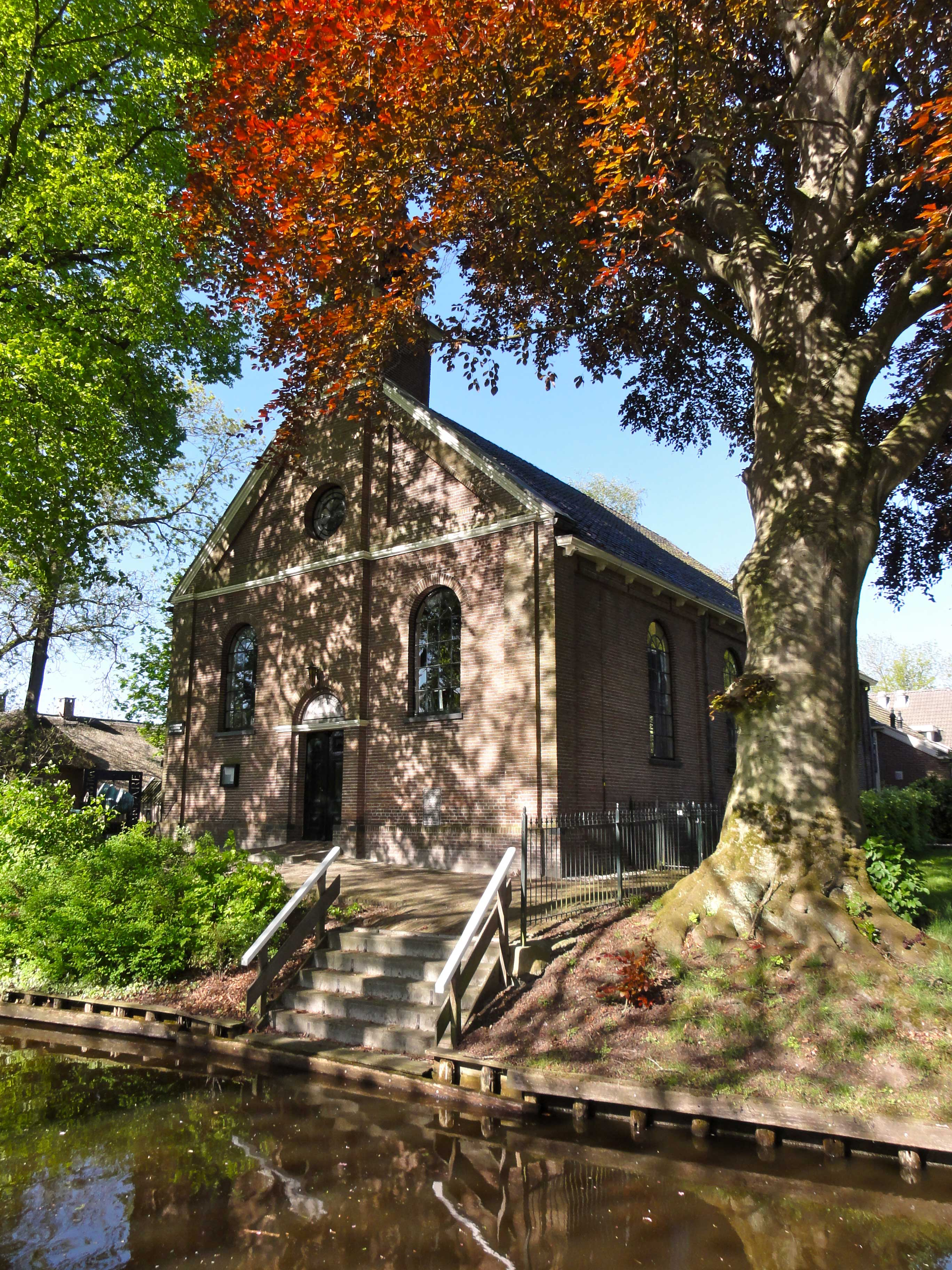 Binnenpad 48 doopsgezinde kerk Giethoorn (rijksmonument)